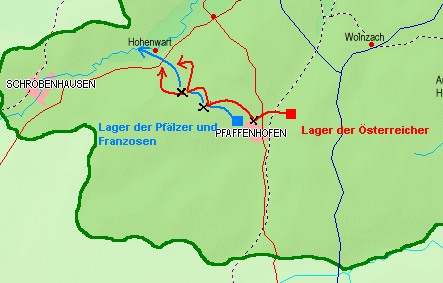 Skizze zur Schlacht bei Pfaffenhofen